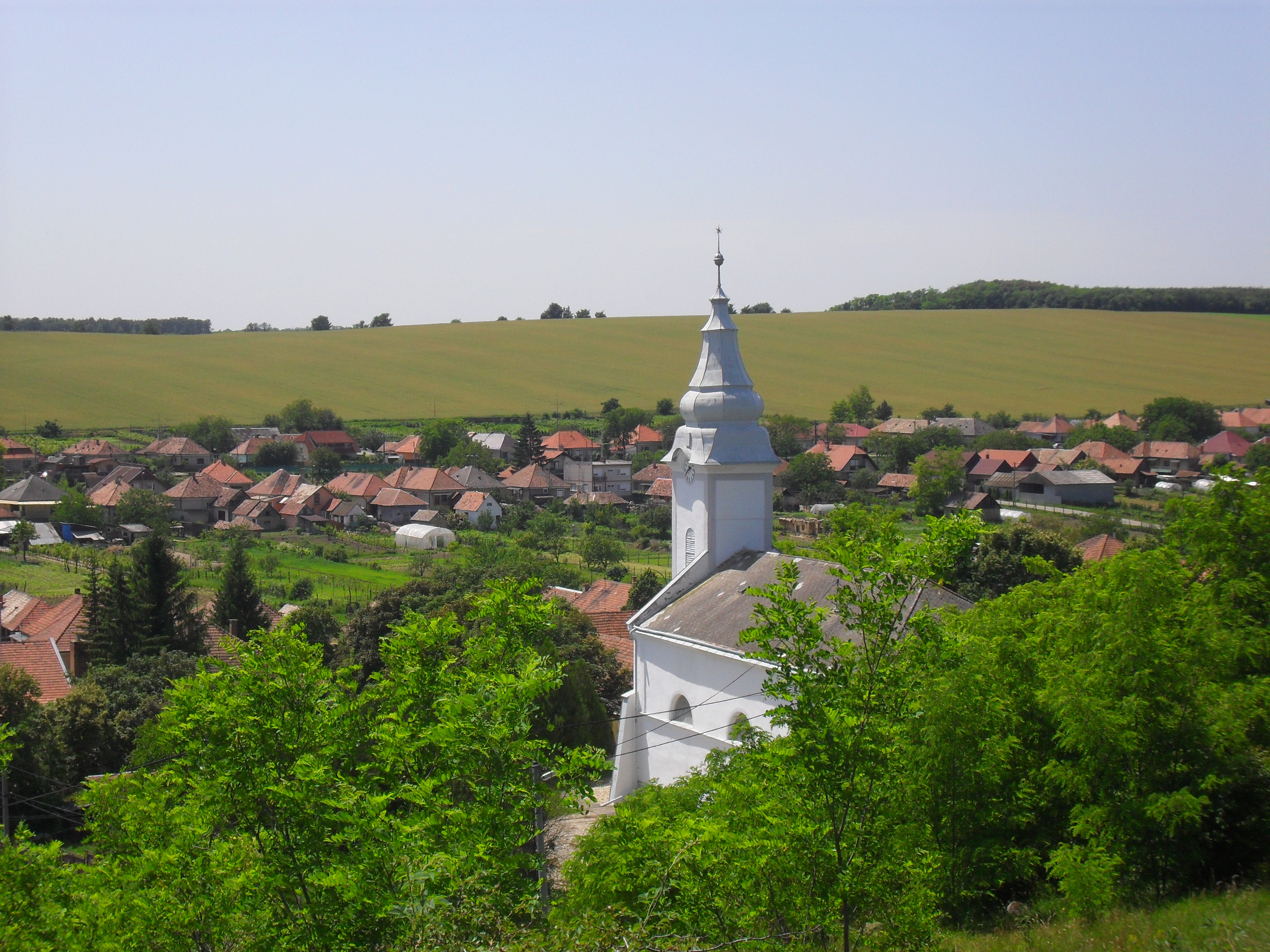 Madar - a falu látkép a temetődombról (előtérben a református templom)